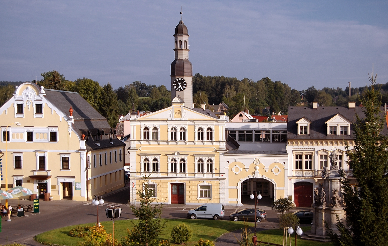 Radnice na náměstí 1. máje v Chrastavě, vlevo budova muzea, vpravo morový sloup.